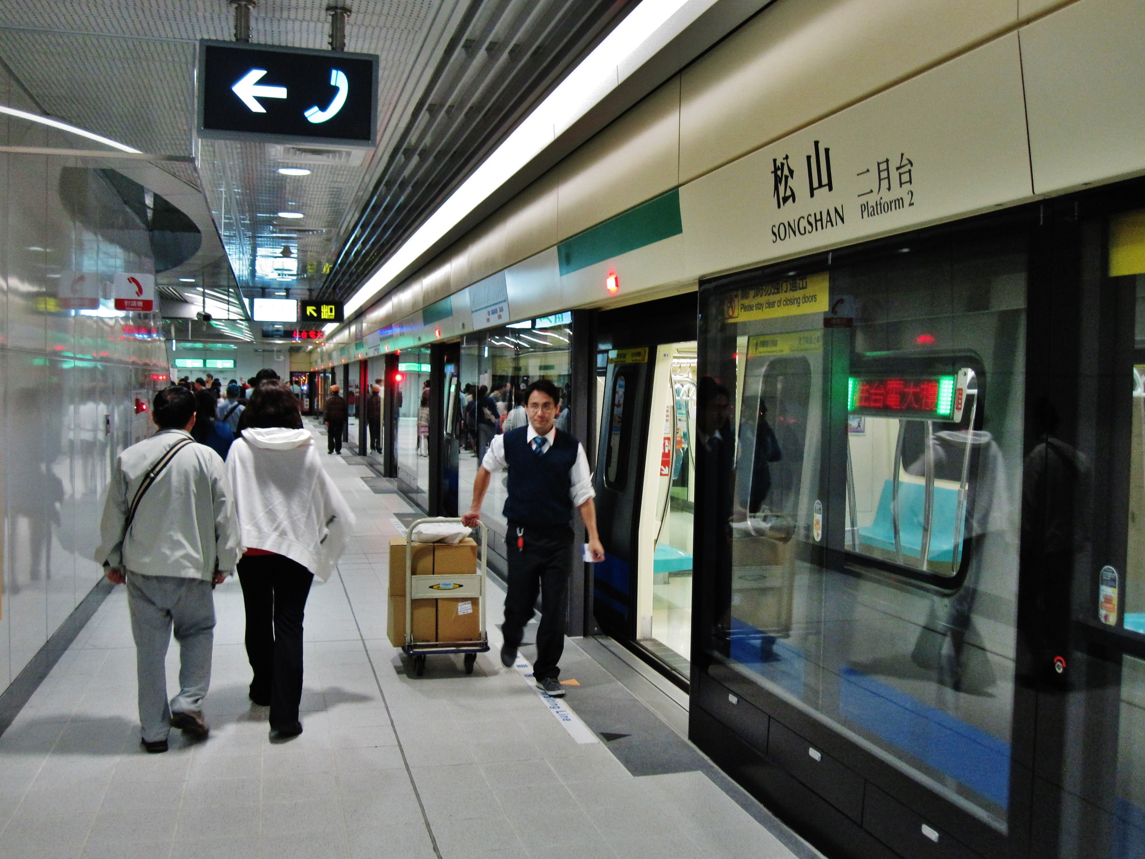 台北捷運松山線松山站二月台